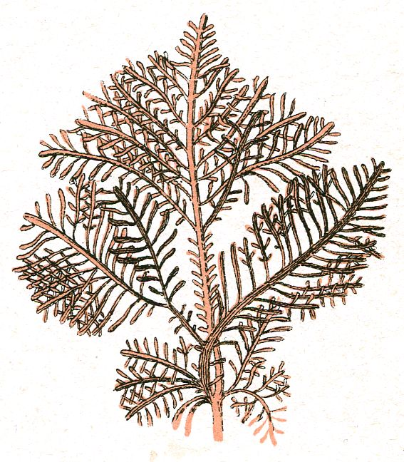 Gelidium corneum, Illustration from «Naturgeschichte des Pflanzenreichs», table LII